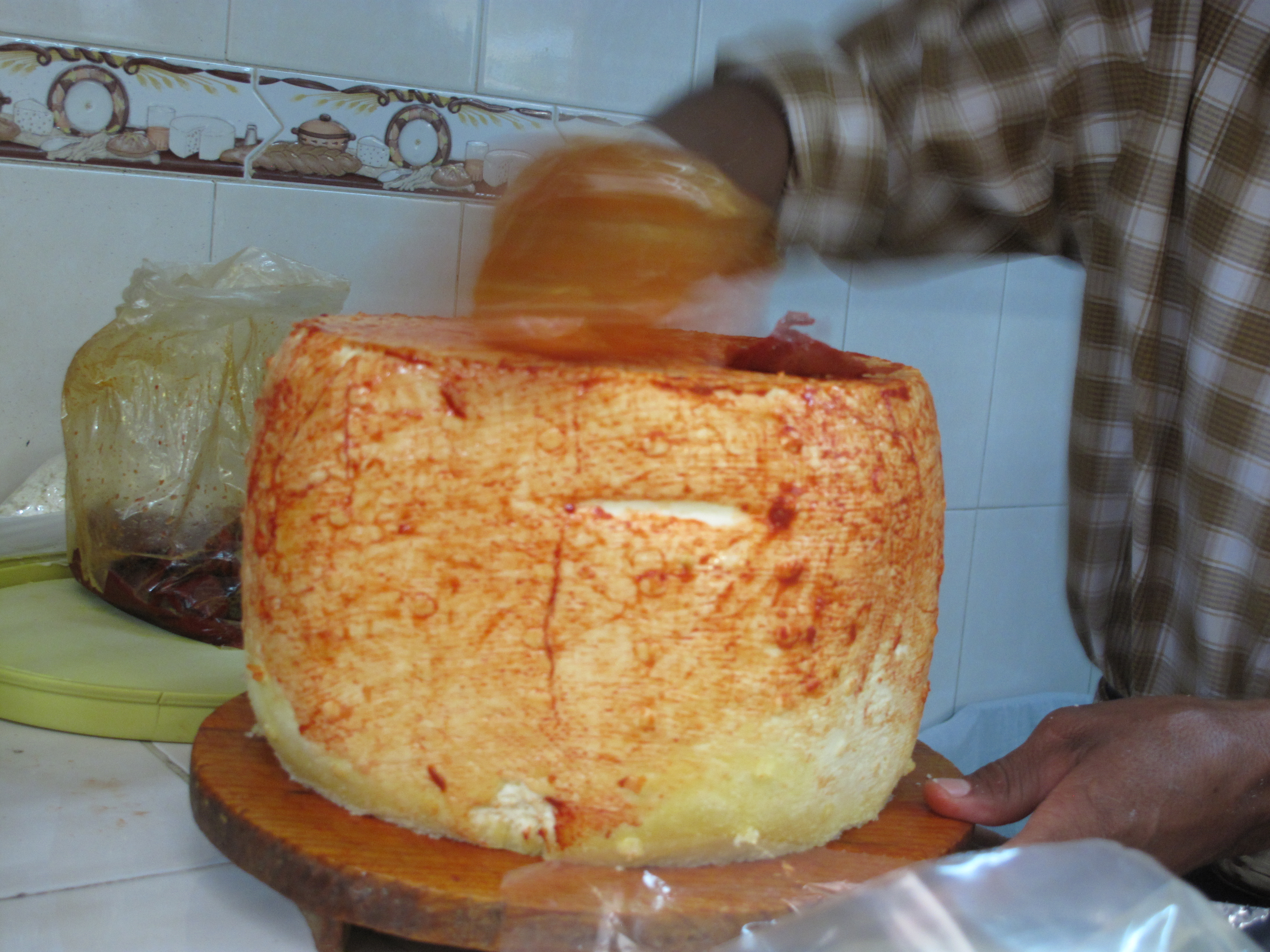 Fromage criollo.